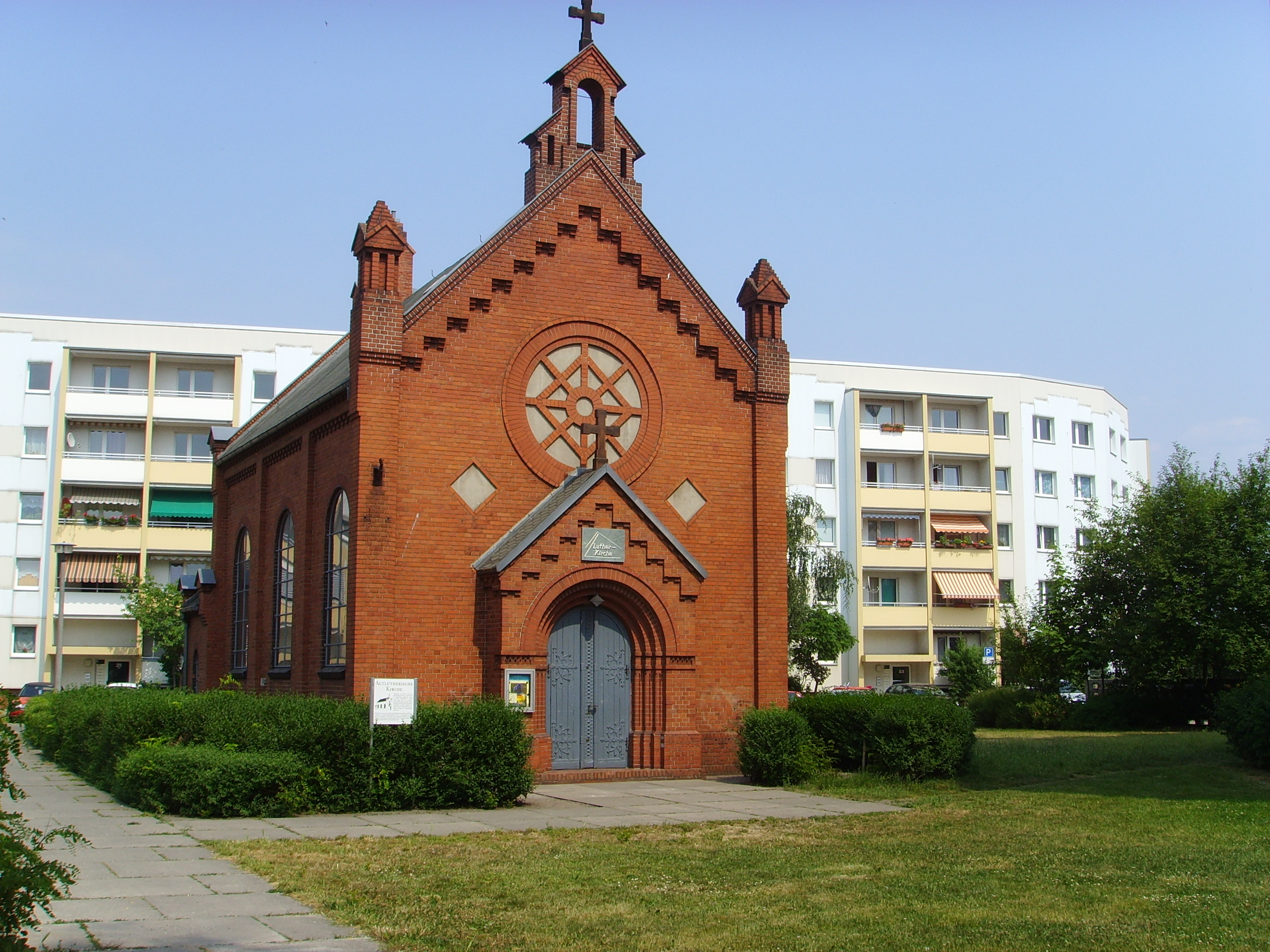 Lutherkirche der SELK, Altlutherische Kirche im ehemaligen Senftenberger Vorort Jüttendorf